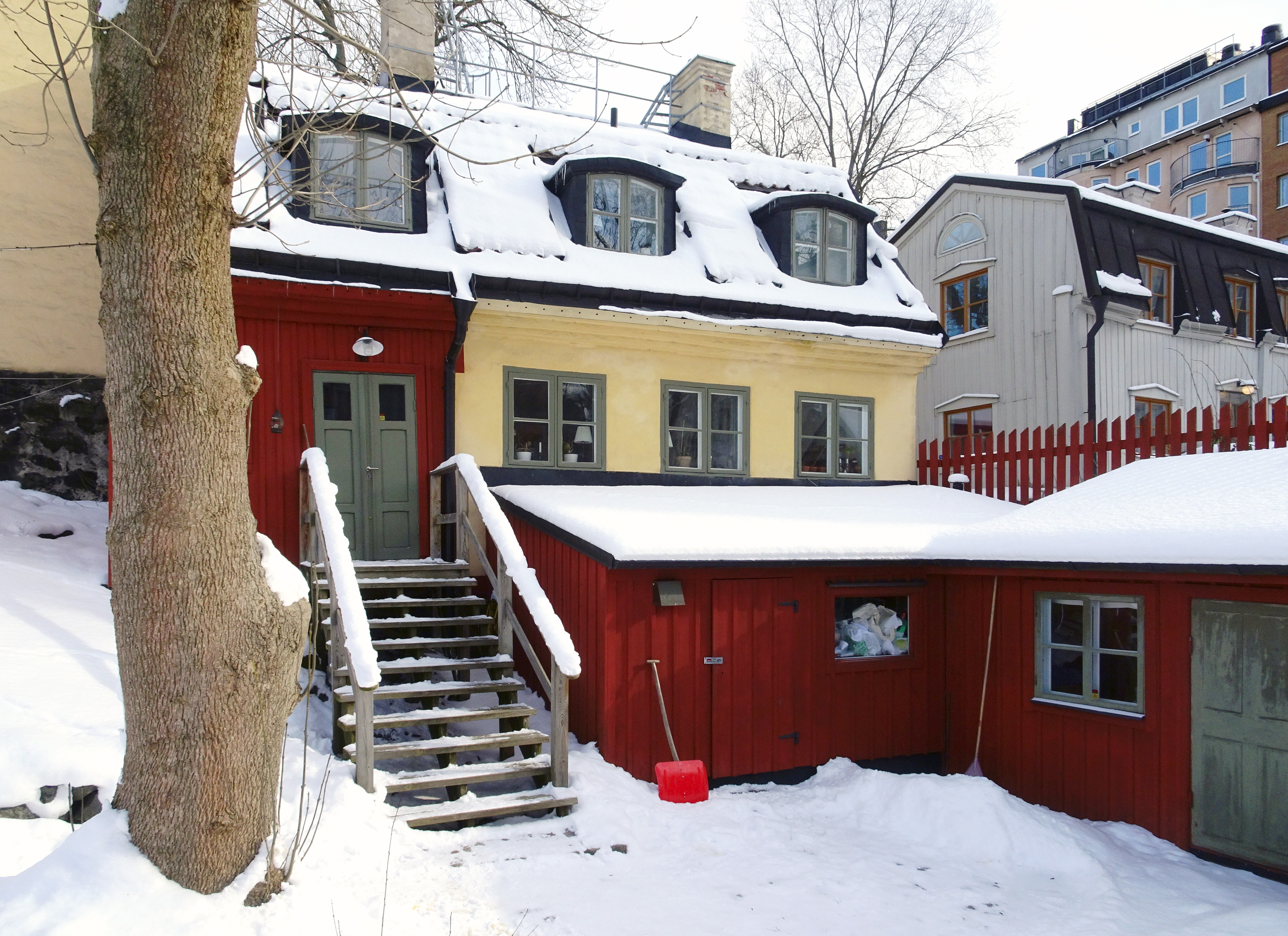 Lilla Skinnarviksgränd nr 2 mot öster